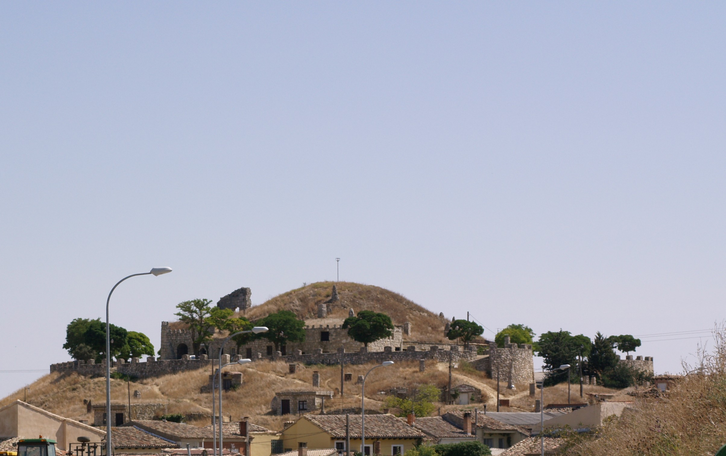 Vista Castillo de la Mota y Bodegas